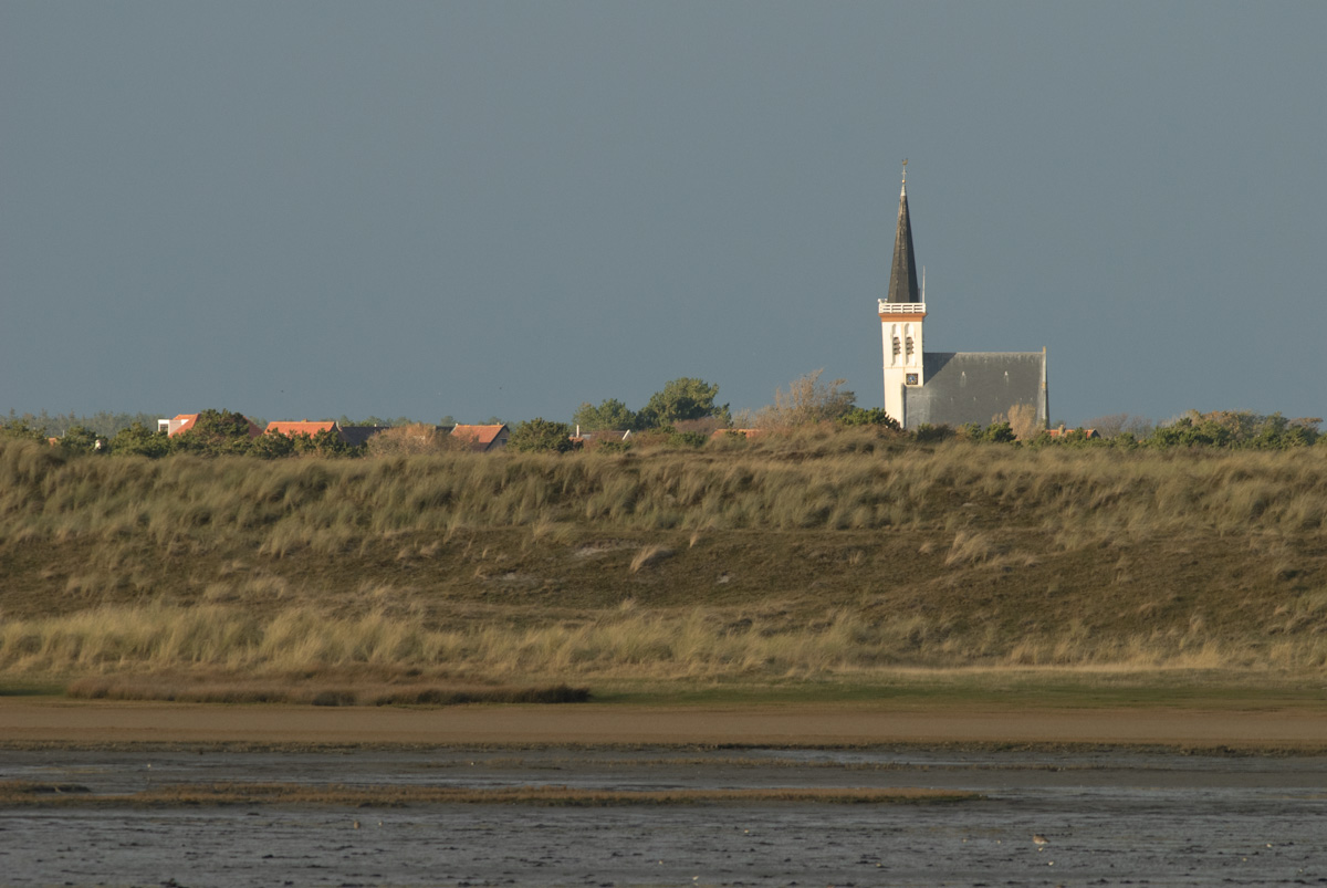 kerkje Den Hoorn, Texel